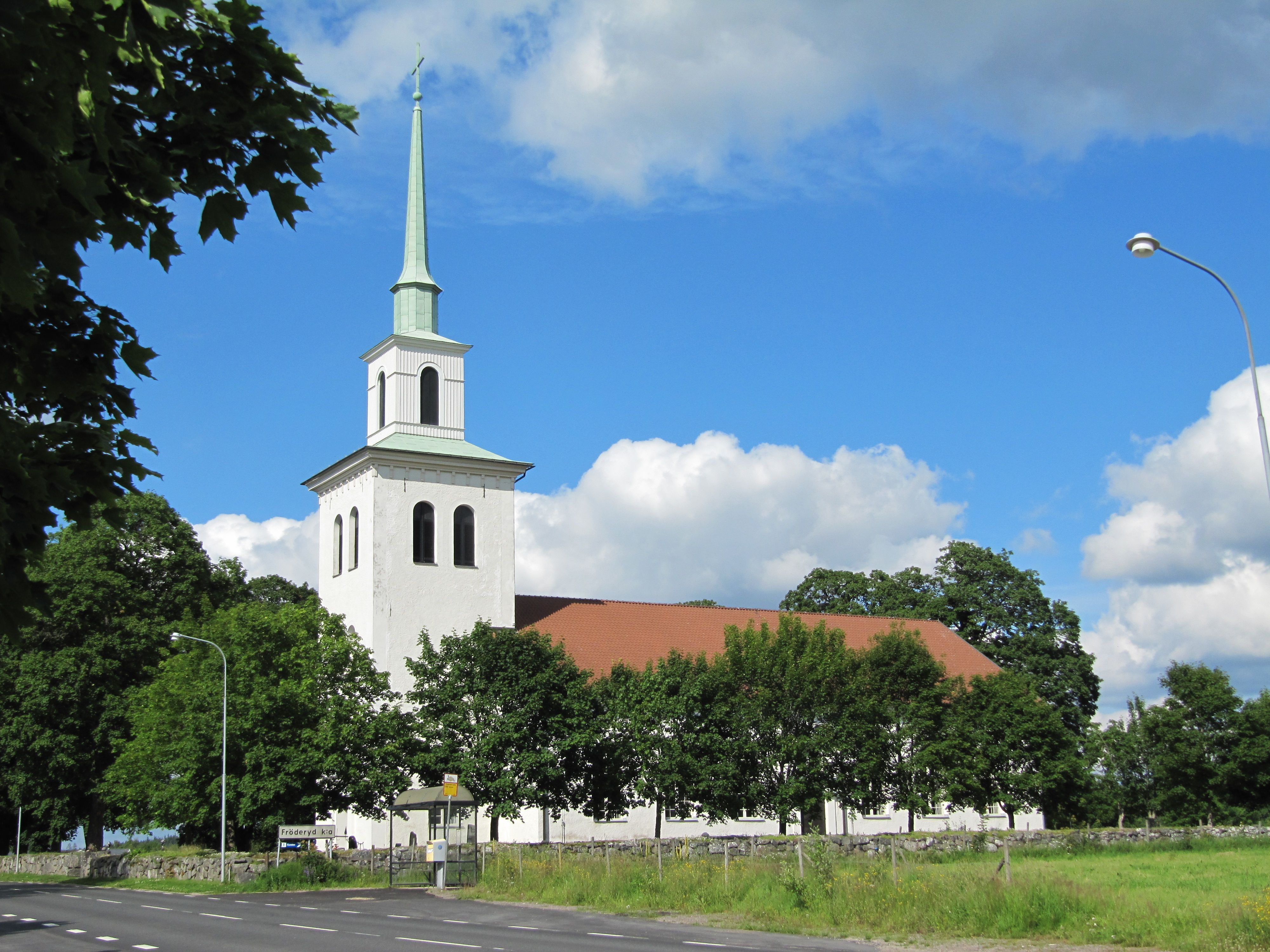 Fröderyds kyrka